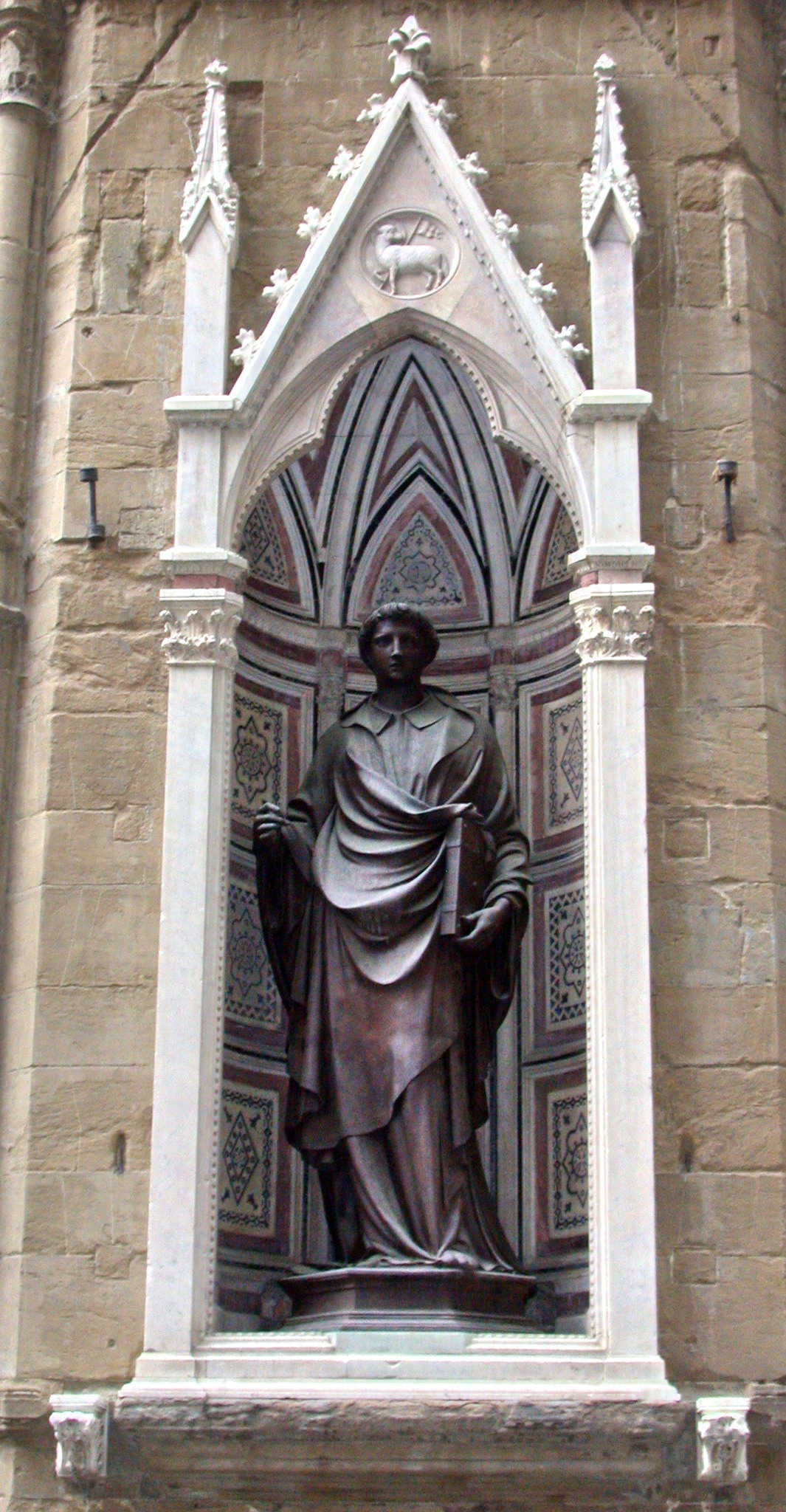 Firenze, Orsanmichele, Tabernacolo dell'arte della Lana, con Santo Stefano di Lorenzo Ghiberti.